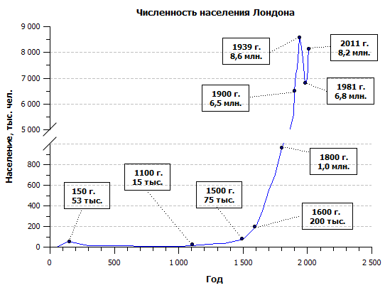 График изменения населения Лондона